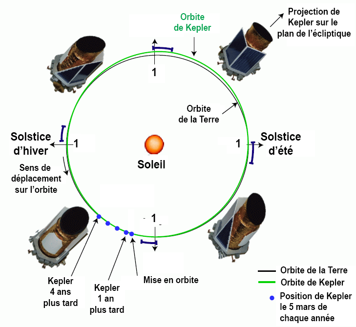 Orbite du télescope spatial Kepler Version francaise